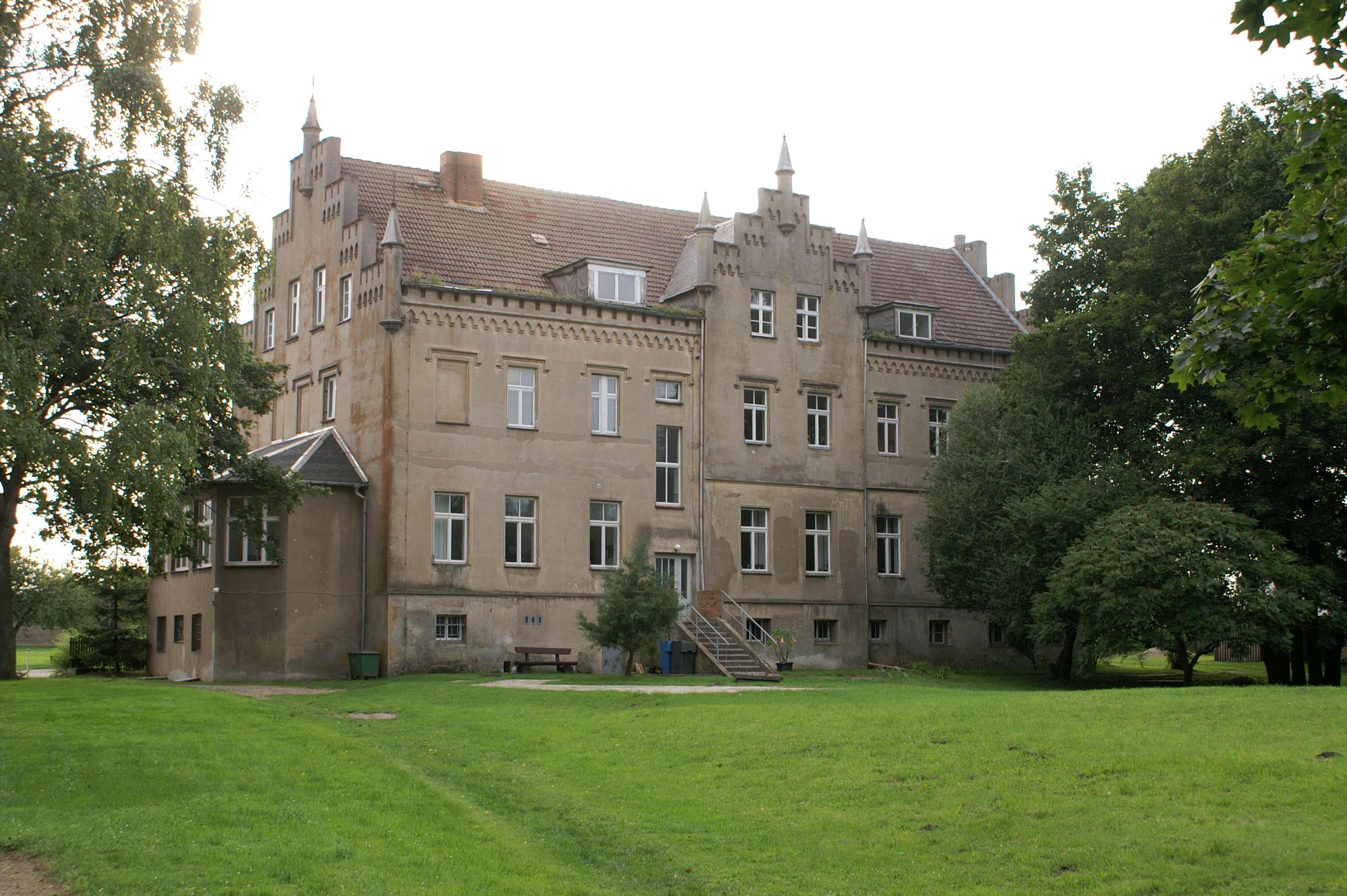 Wrangelsburg- Landkreis Ostvorpommern - Herrenhaus, Parkseite